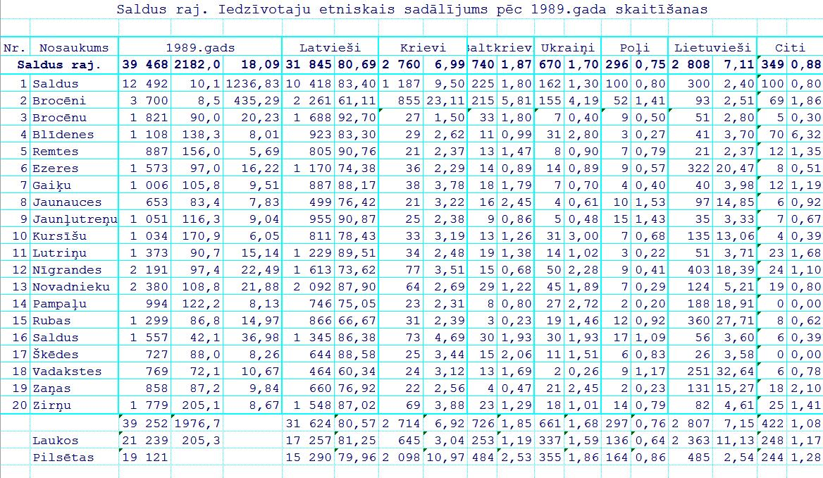 Этнический состав населения Латвии по переписи 1989 года